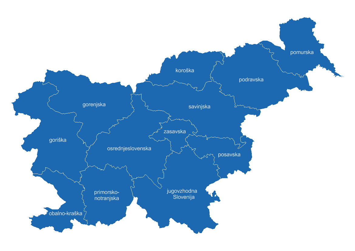 Statistične regije